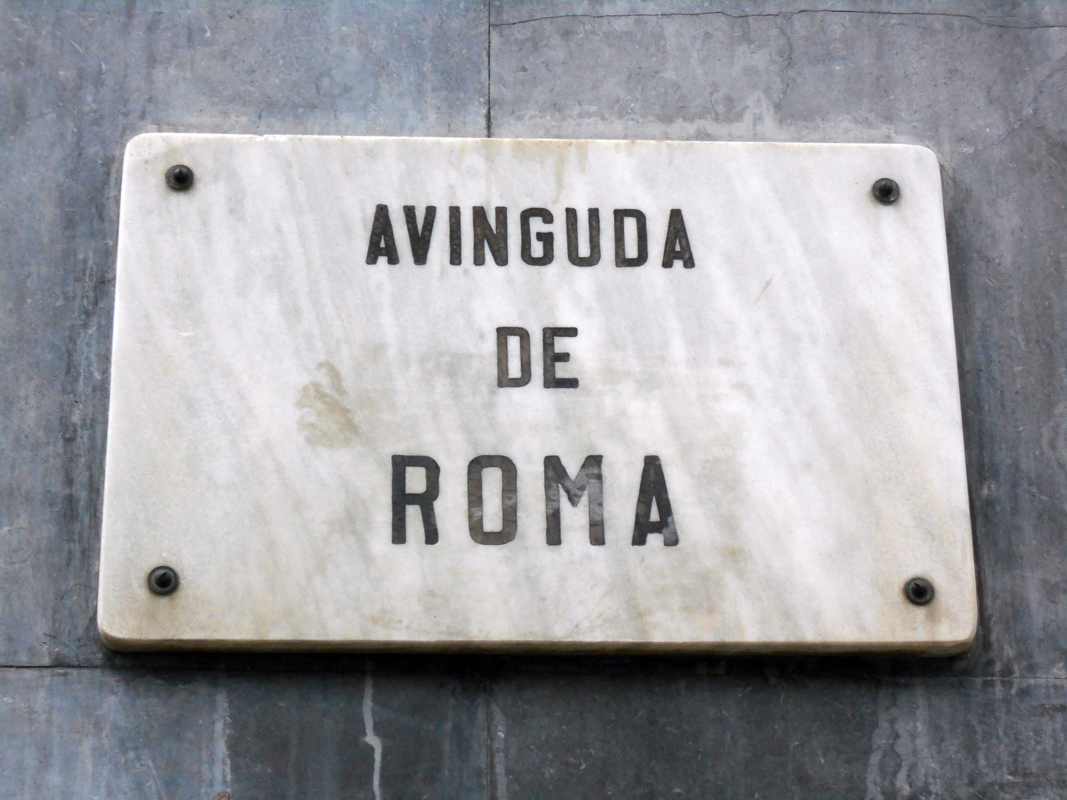 Avenida de Roma.